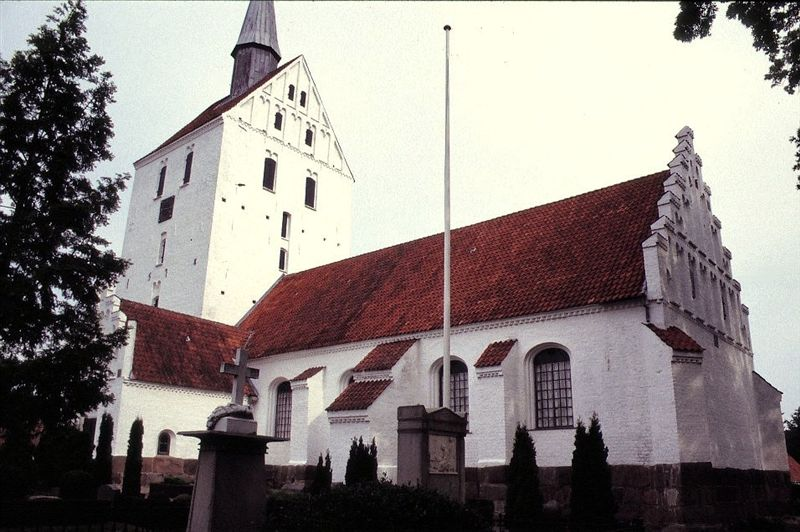 Svindinge Kirke i Danmark. Svindinge kirke